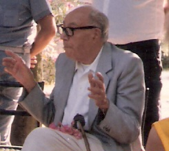 Un'immagine di Vinci Verginelli negli anni '80.